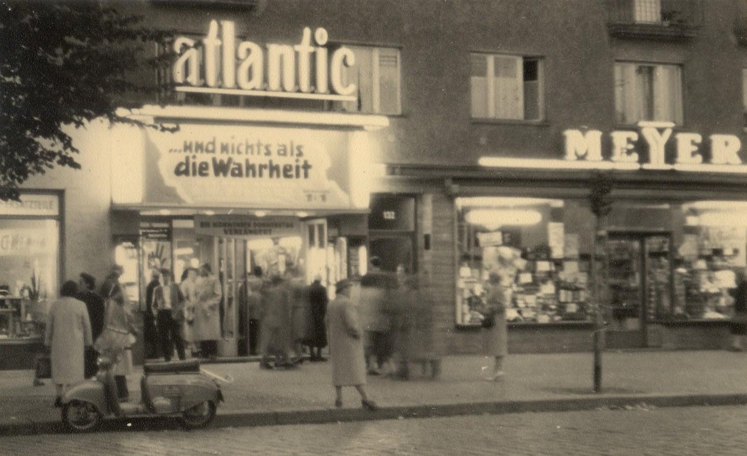 Kino Atlantic, Berlin-Wedding, Brunnenstraße 132